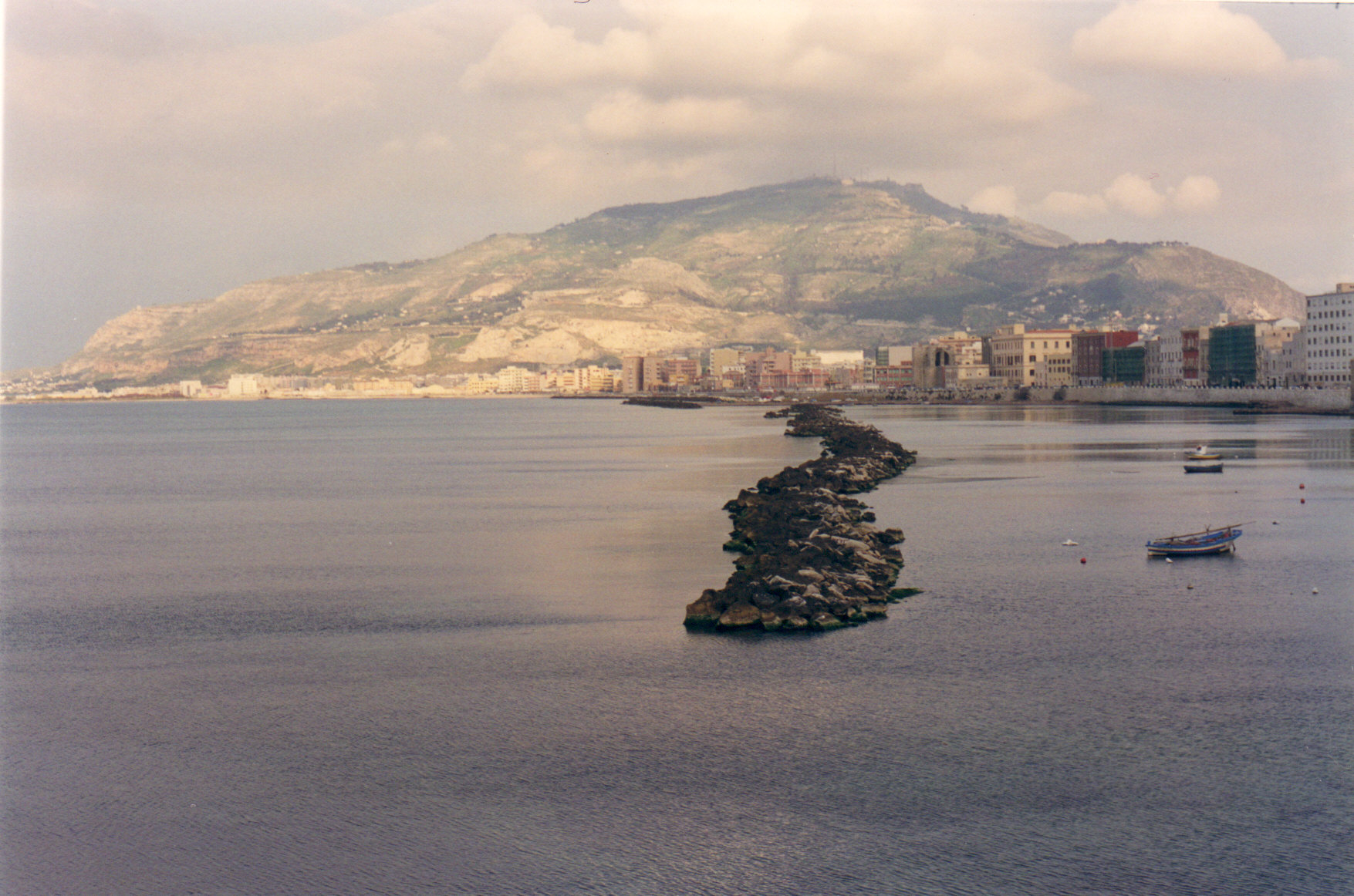 Trapani foto dalle vecchie mura di tramontana, sullo sfondo il monte Erice